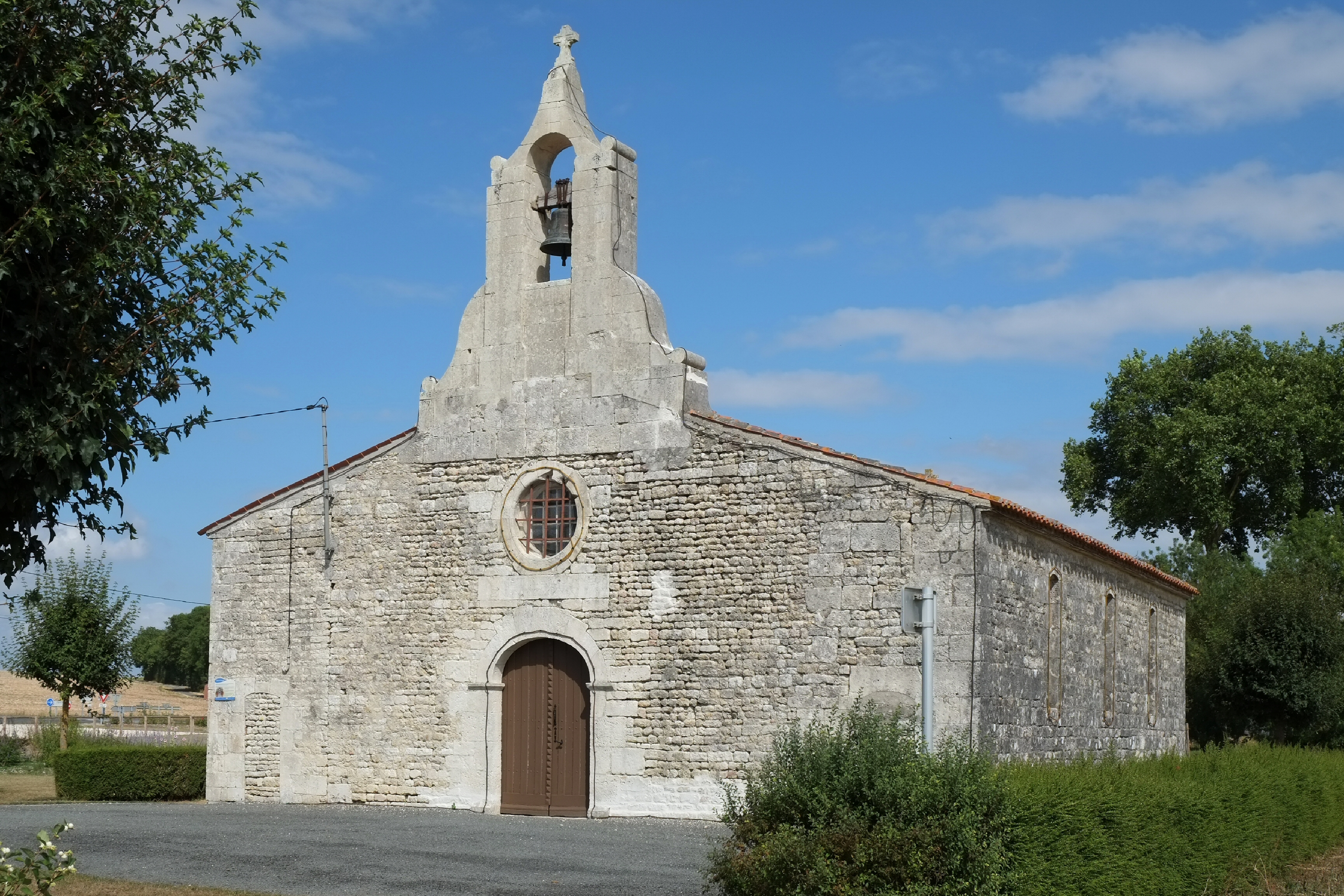 Église Saint-Martin Bazauges Charente-Maritime France